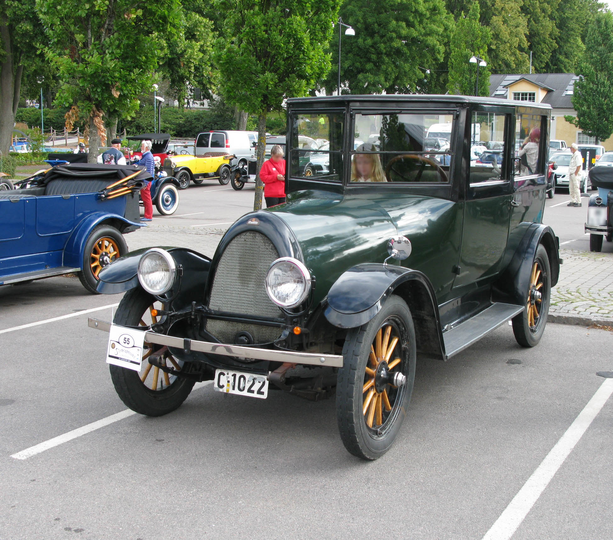 Franklin 9B Sedan 1922